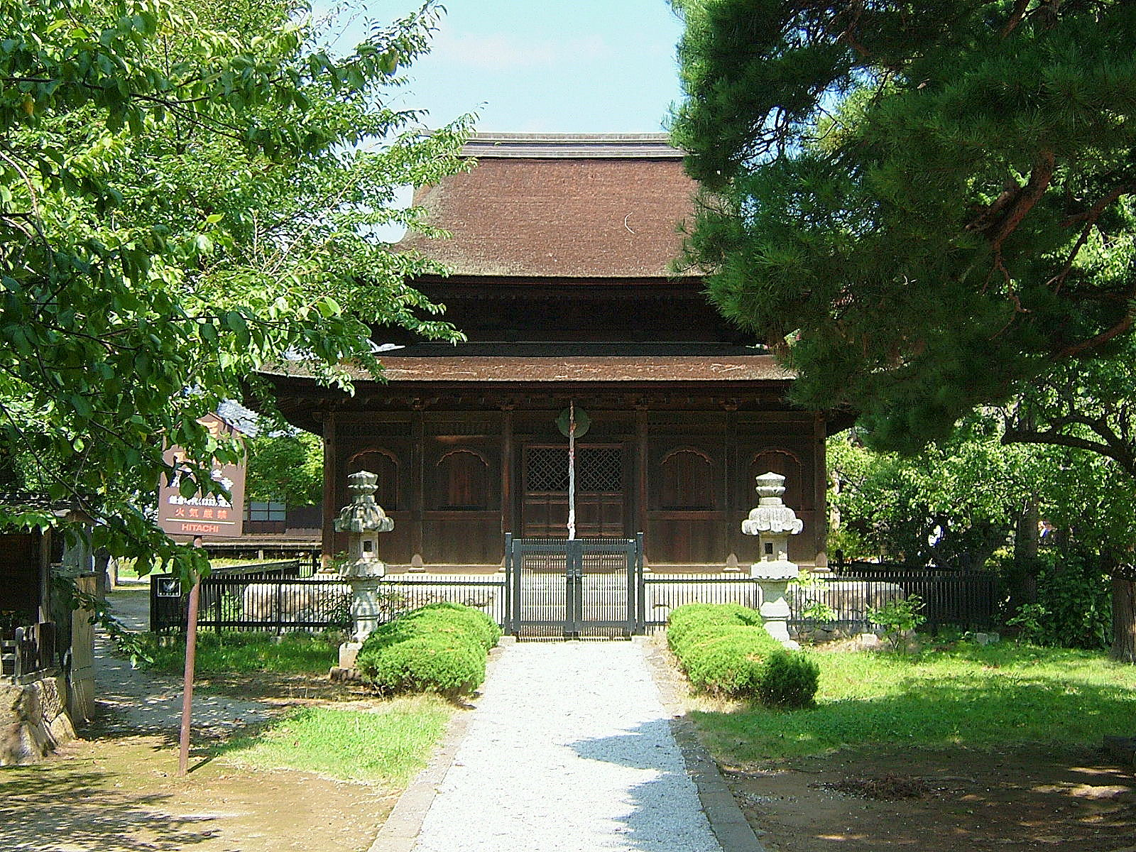 清白寺仏殿